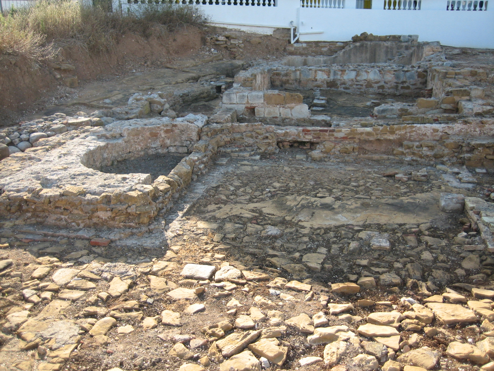 Roman Baths, Luz